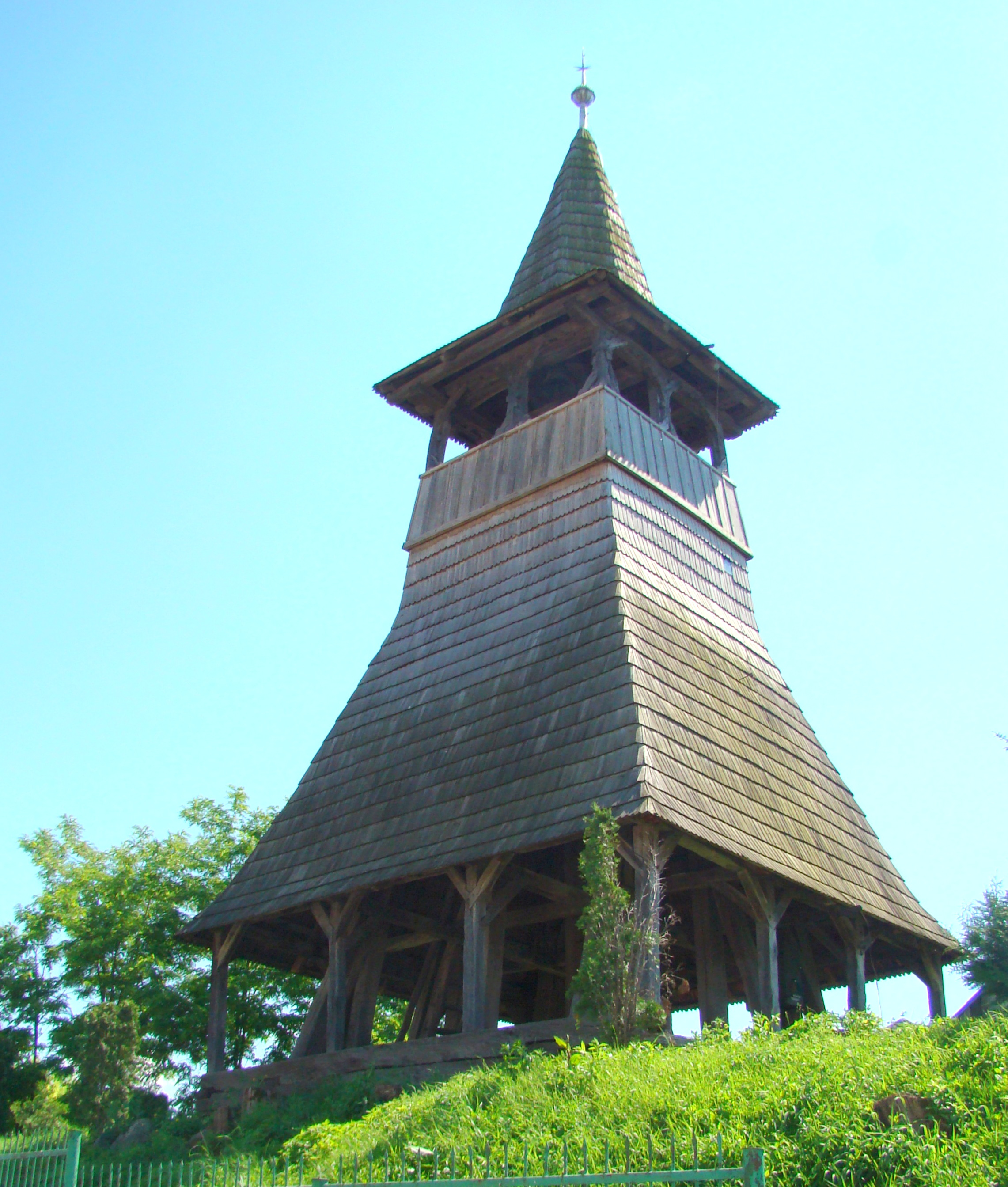 Clopotniță din lemn, sat Agrișteu; comuna Bălăușeri, judeţul Mureş 02